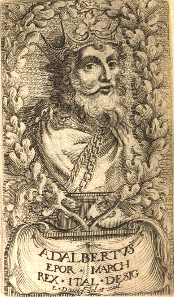 Ilustración del libro indicado, dibujada por Alessandro Zeno